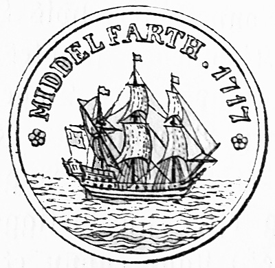 Middelfarts købstadssegl fra 1717